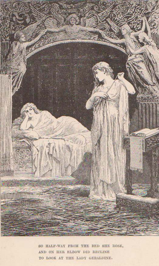 Digitalizada a partir do The Blue Fairy Book, editado por Andrew Lang. Ilustrações por H. J. Ford e Lancelot Speed. Londres, Longmans, Green e Co. 1891